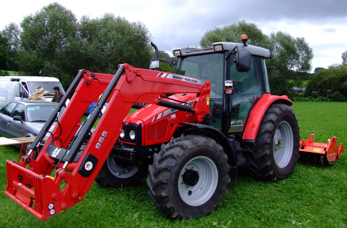 Massey-Ferguson-Traktor 5445 mit MF-Frontlader 955